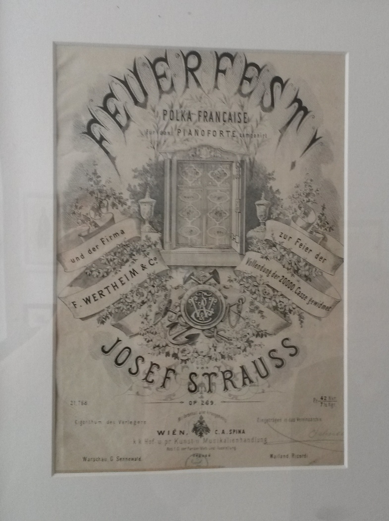 Titelseite der Erstausgabe der Feuerfestpolka von Josef Strauss.